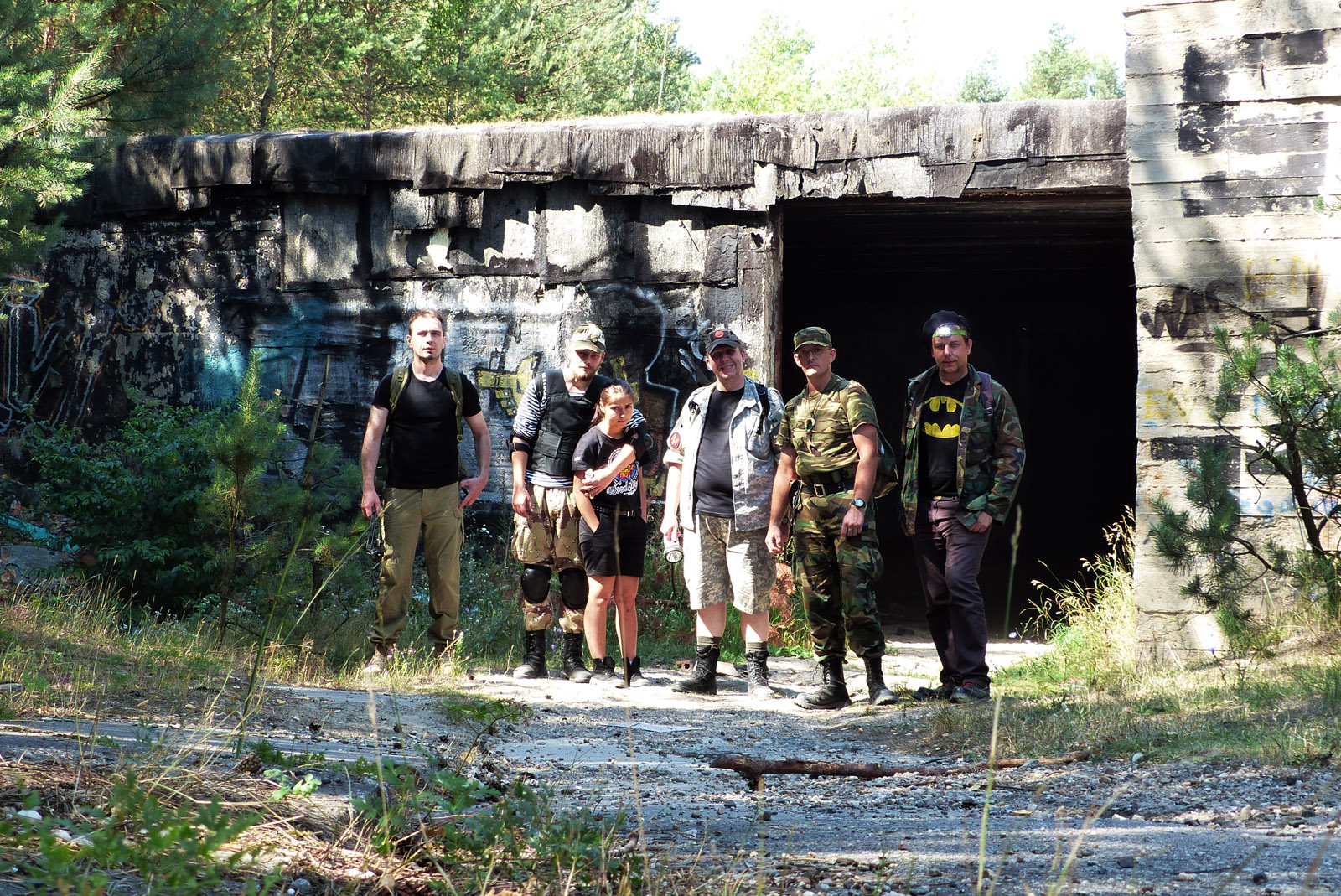 Fani książek z serii Fabryczna Zona z wizytą w Atomowej Kwaterze Dowodzenia